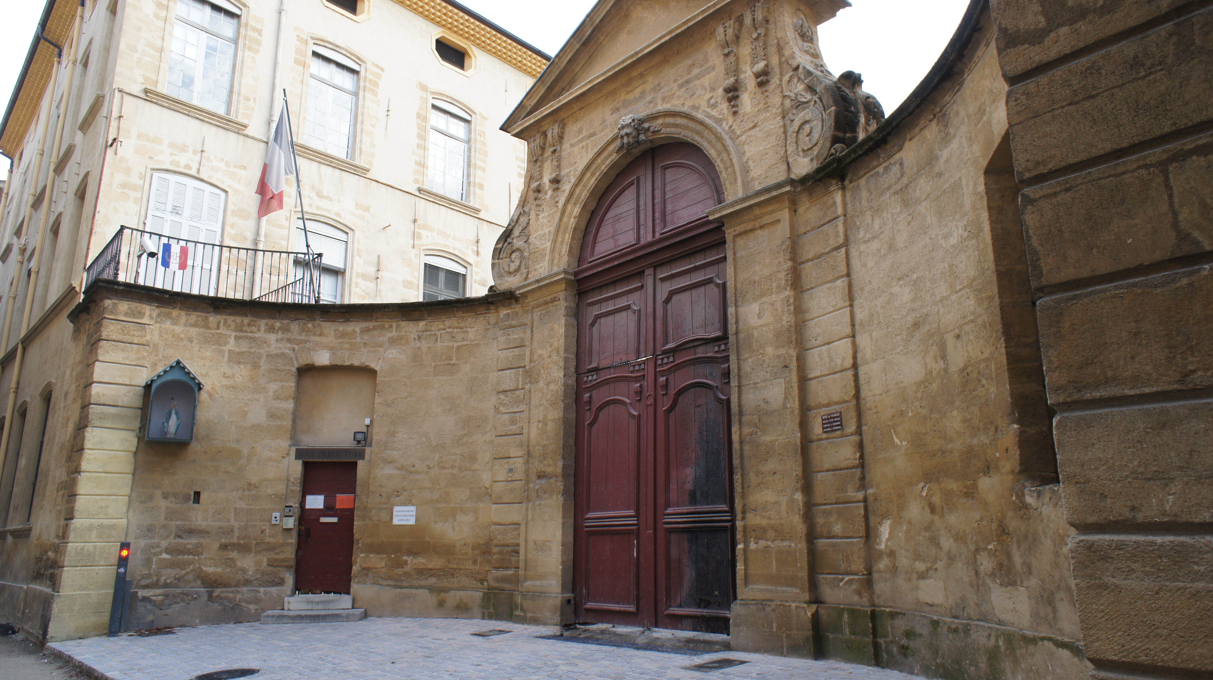 Hôtel de Valbelle, sous préfecture, 24 rue Mignet, rue Lisse-Saint-Louis, Aix-en-Provence (France). .